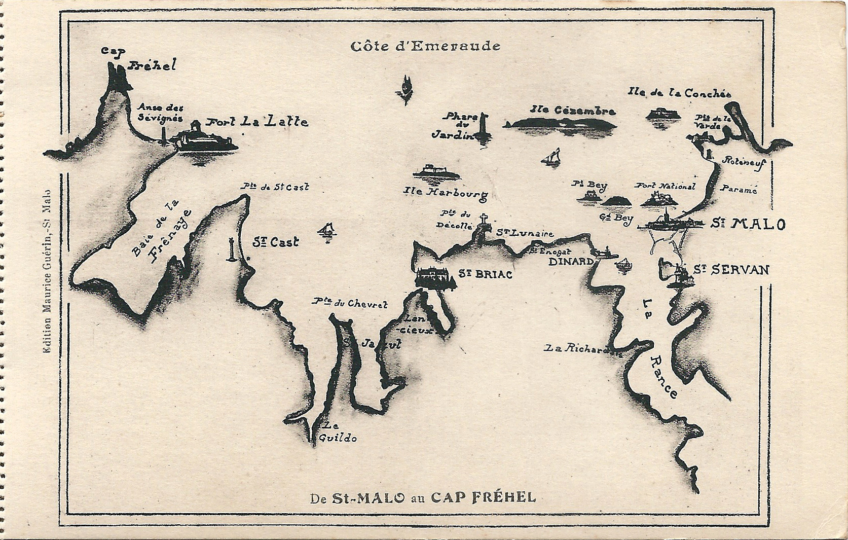 Le Côte d’Émeraude (Bretagne, France) ; vers 1920